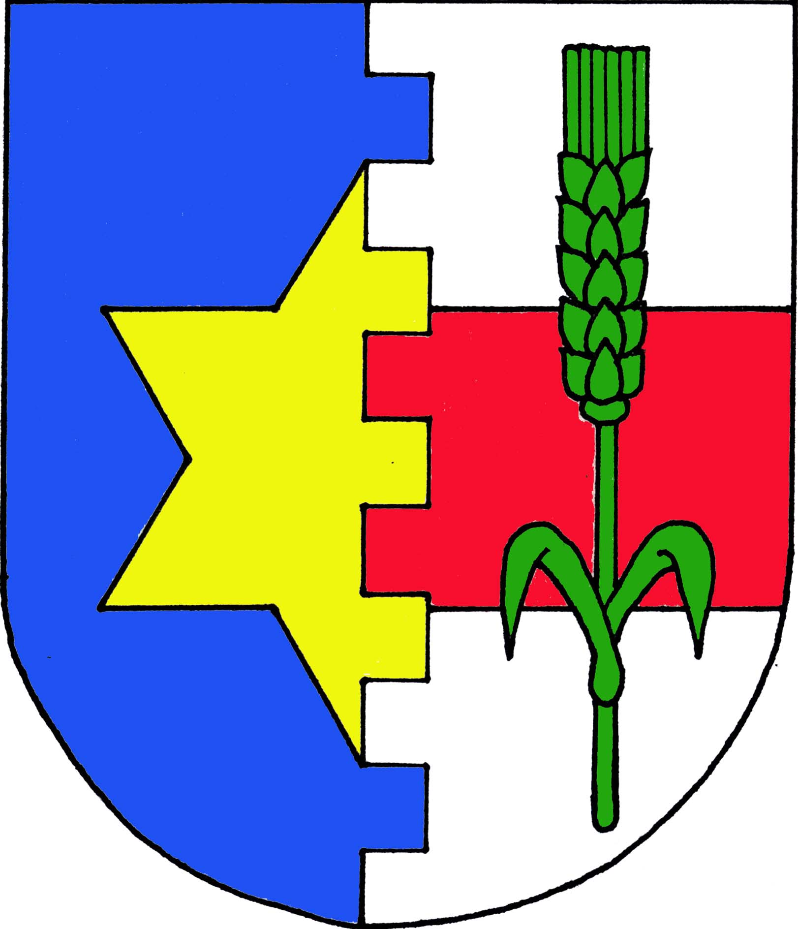 Znak obce Čeradice